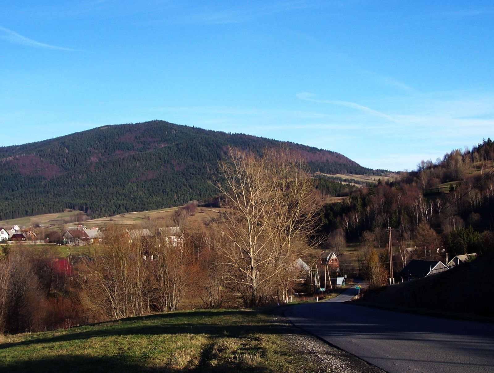 Łopień (Beskid Wyspowy)